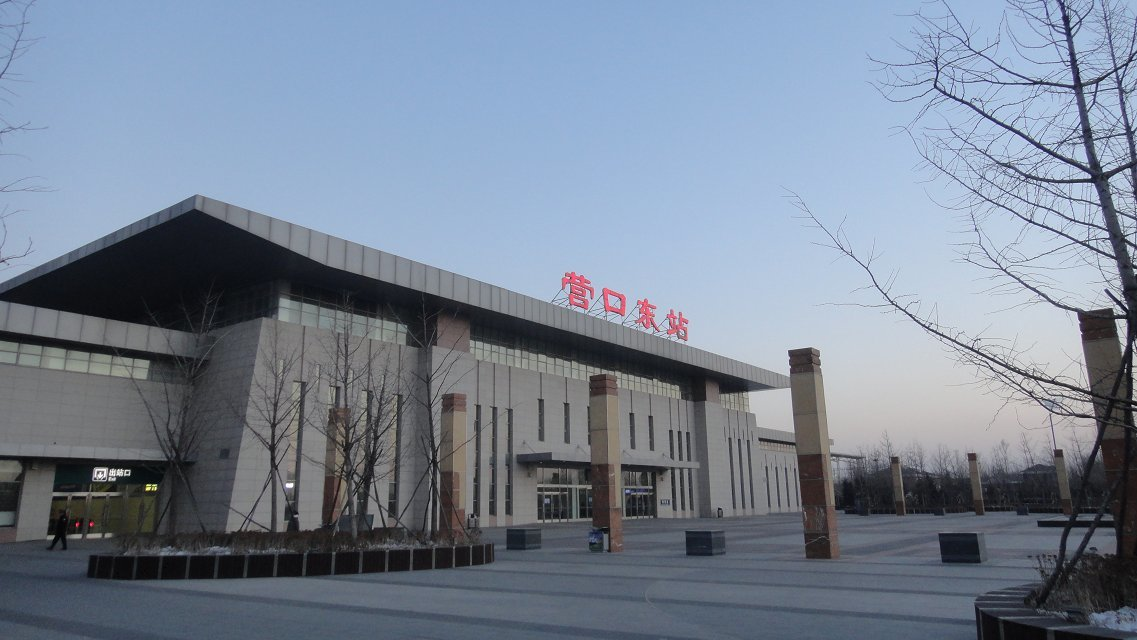 营口东站主站房